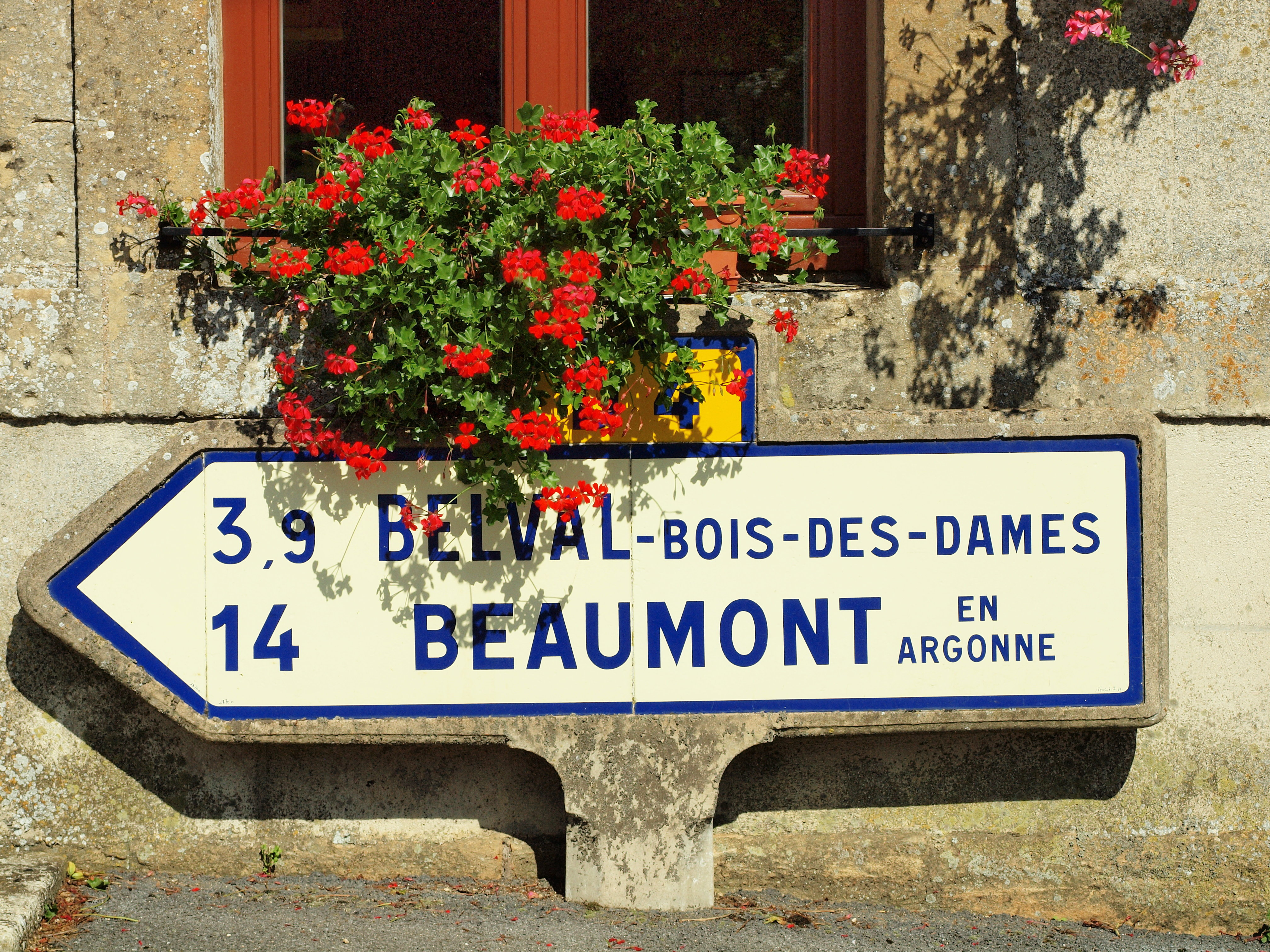 Nouart (Ardennes, France) ; panneau indicateur vers Belval-Bois-des-Dames & Beaumont-en-Argonne